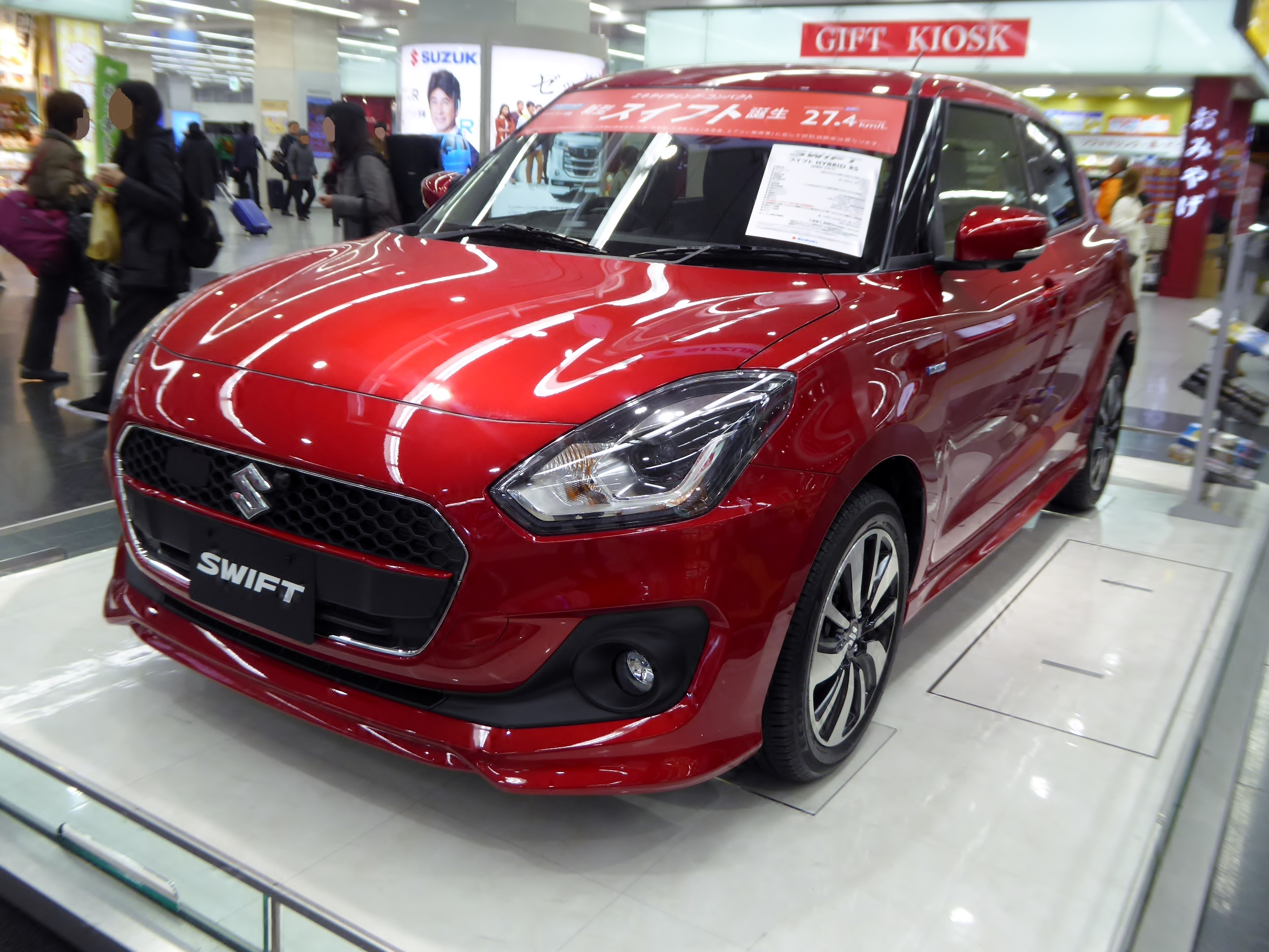 DAA-ZC53S-VBRB型スズキ・スイフトHYBRID RSをフロントから撮影。